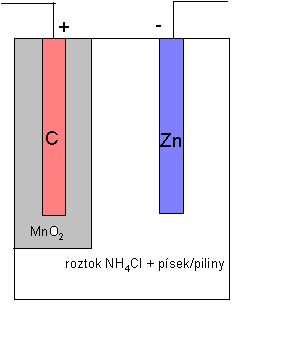 nákres suchého článku